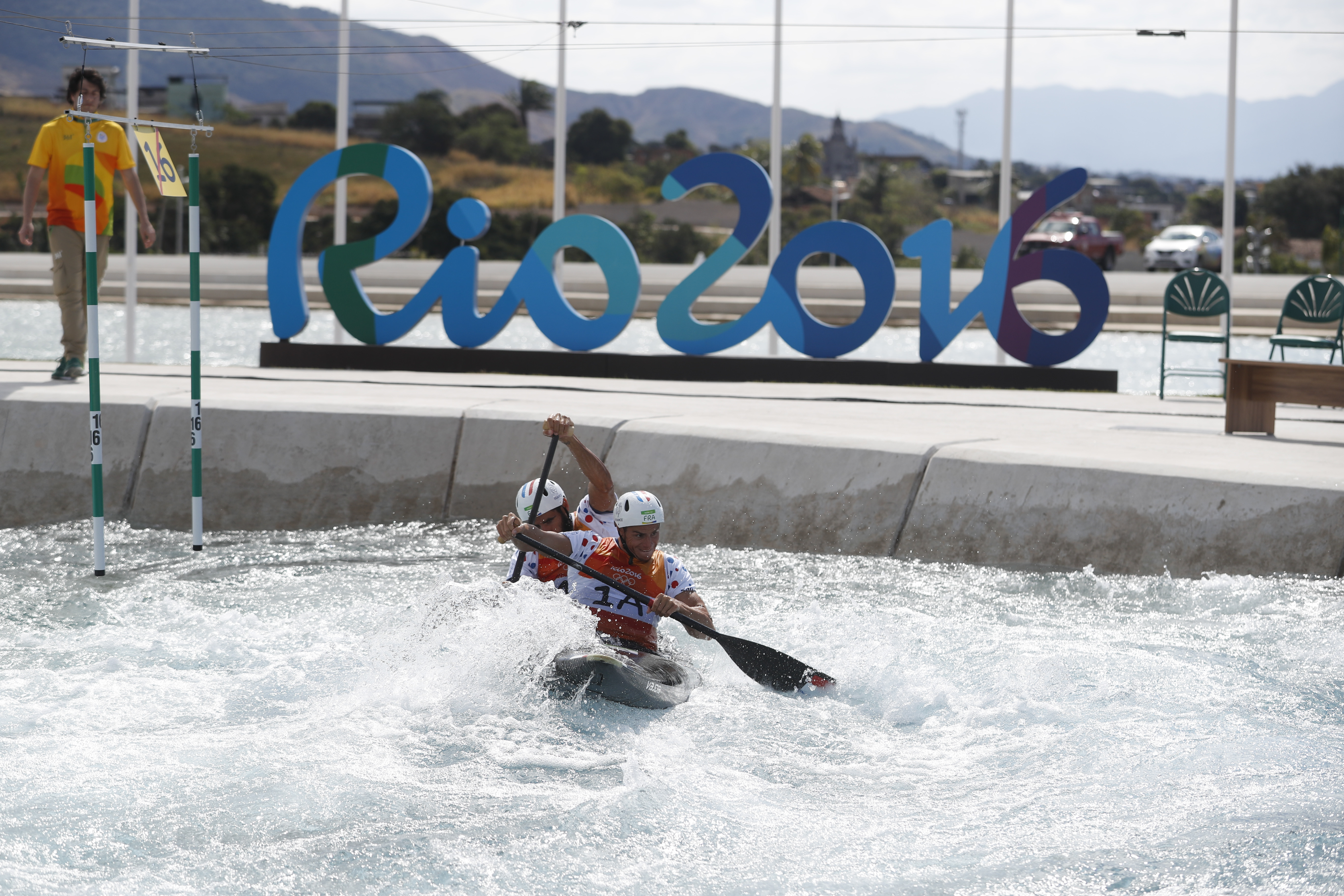 Rio de Janeiro - Franceses Gauthier Klauss e Matthieu Peche levam medalha de prata na canoagem slalom categoria C2 nos Jogos Olímpicos Rio 2016 no X Park em Deodoro (Fernando Frazão/Agência Brasil)